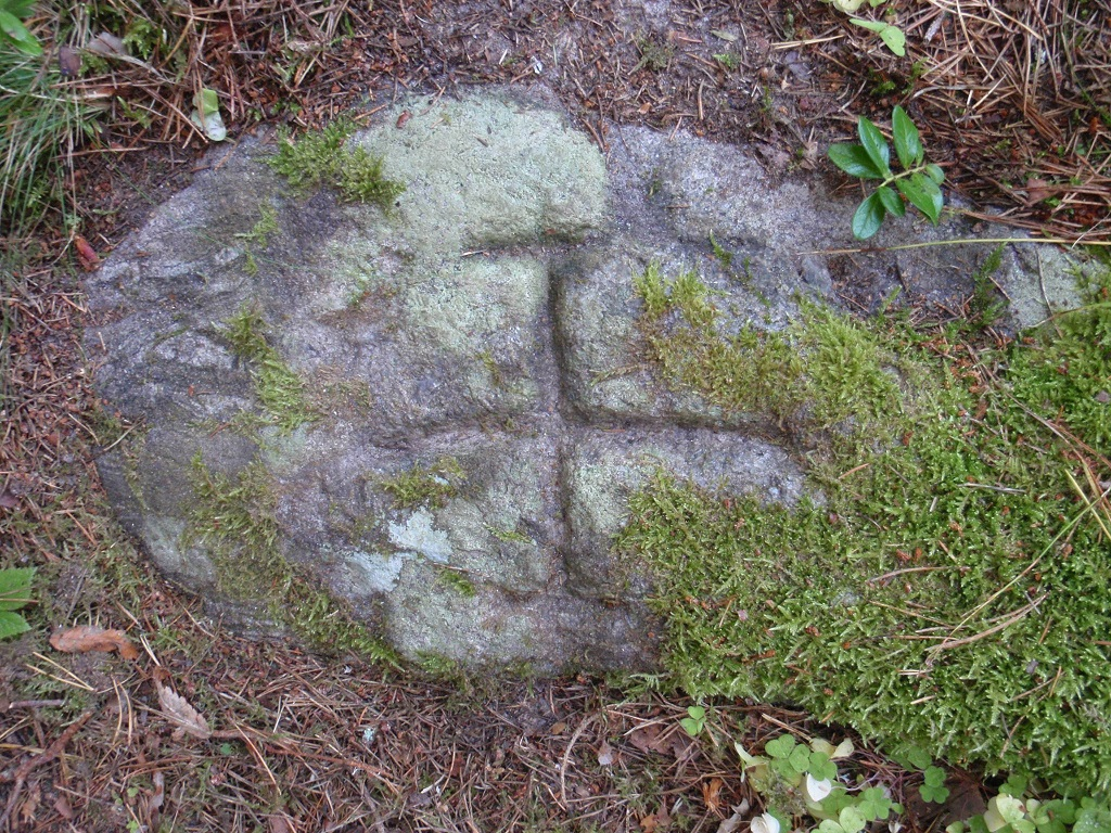 Piirikivi